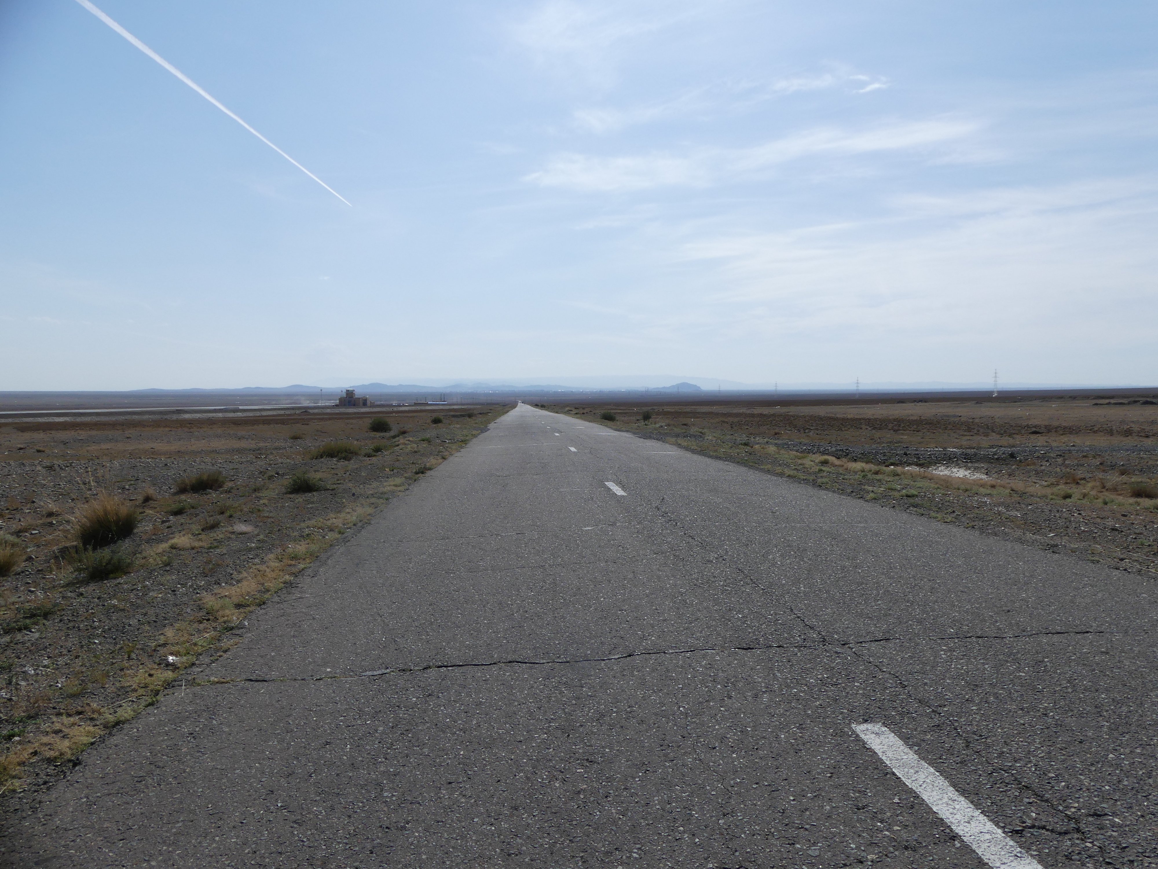 Route asphaltée en Mongolie, proche de la ville de Ölgii, sans véhicule